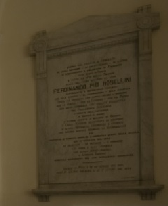 Làpida recordatori de Ferdinando Pio Rosellini (1814-1872), matemàtic, botànic i primer director del Istituto Leardi de Casale Monferrato (Itàlia)